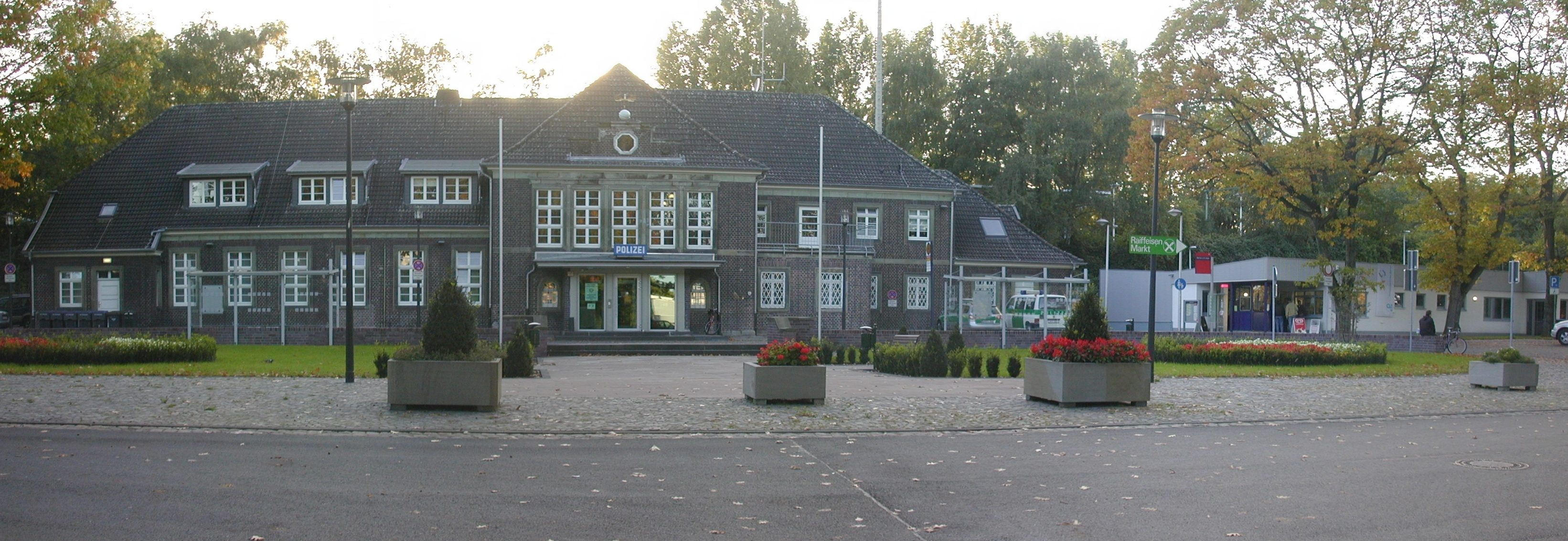 Bahnhof Werne mit Polizeistation This panoramic image was created with Autostitch. Stitched images may differ from reality.